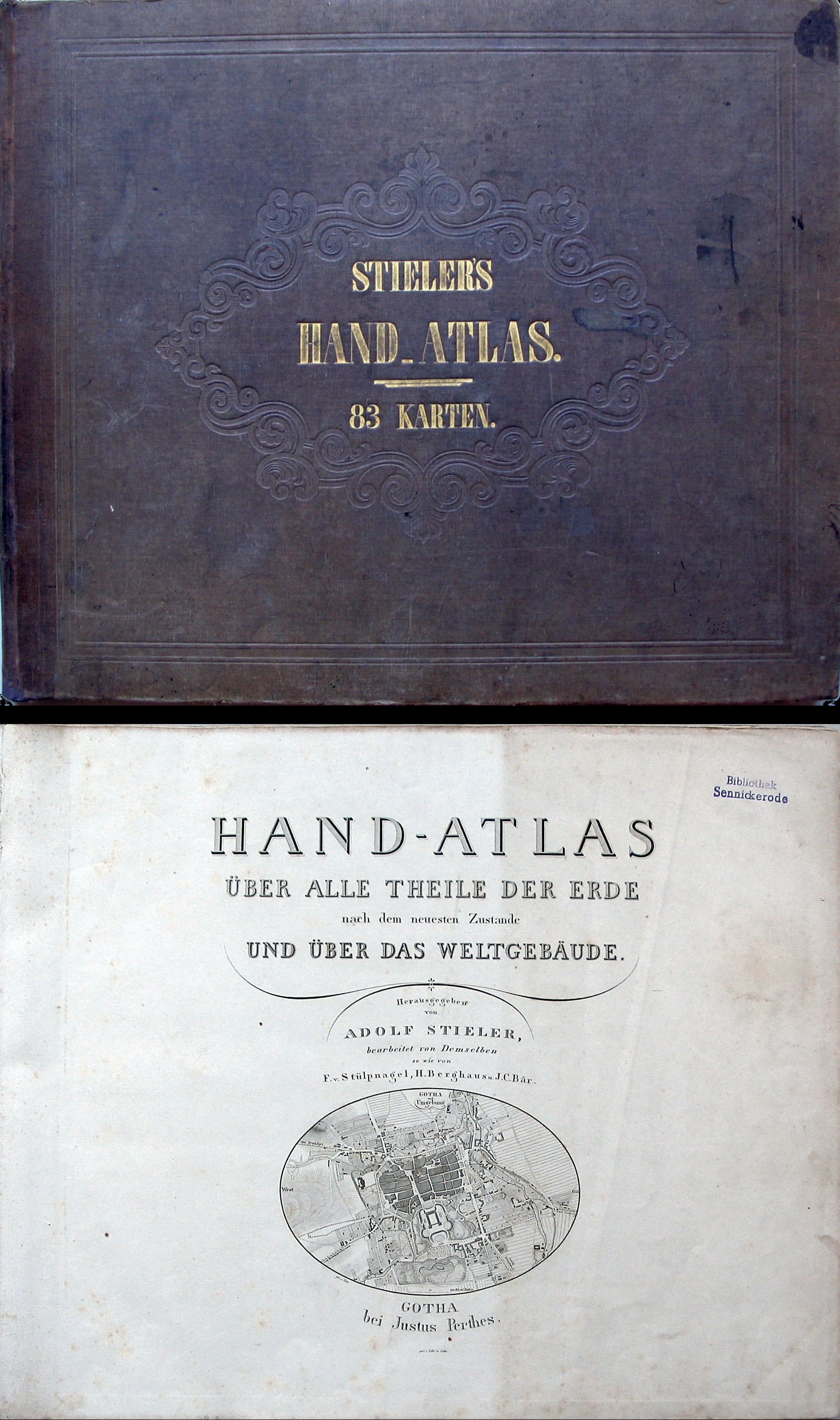 Front und Titelseite von Stieler's Hand-Atlas von 1853